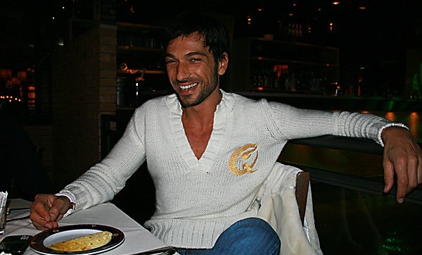 Costantino Vitagliano